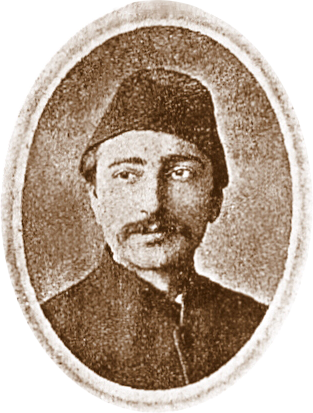 Hagop Balyan'ın portresi